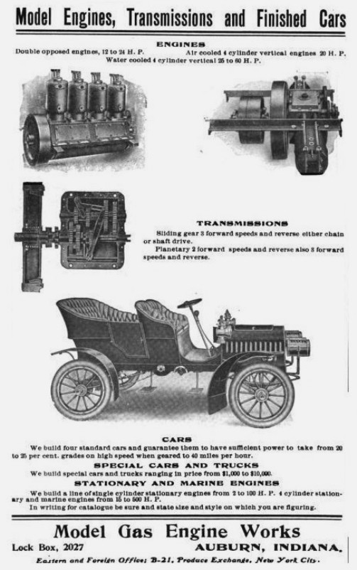 1906 Model Gas Engine Works ad showing stationary and vehicle engines, transmissions, and a Model two-cylinder automobile with its engine under the driver's seat. In the same year, the Company moved from Auburn to Peru, Ind.